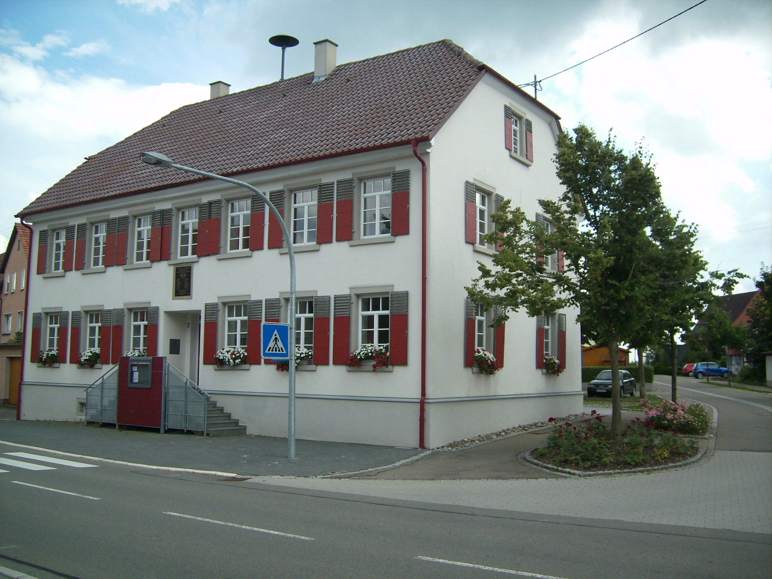 Das Rathaus von Heinstetten, Deutschland the town hall of Heinstetten, Germany